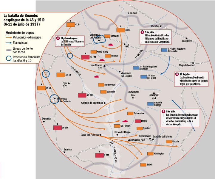 Movimientos de tropas de la batalla de Brunete, días 6-11 julio de 1937.